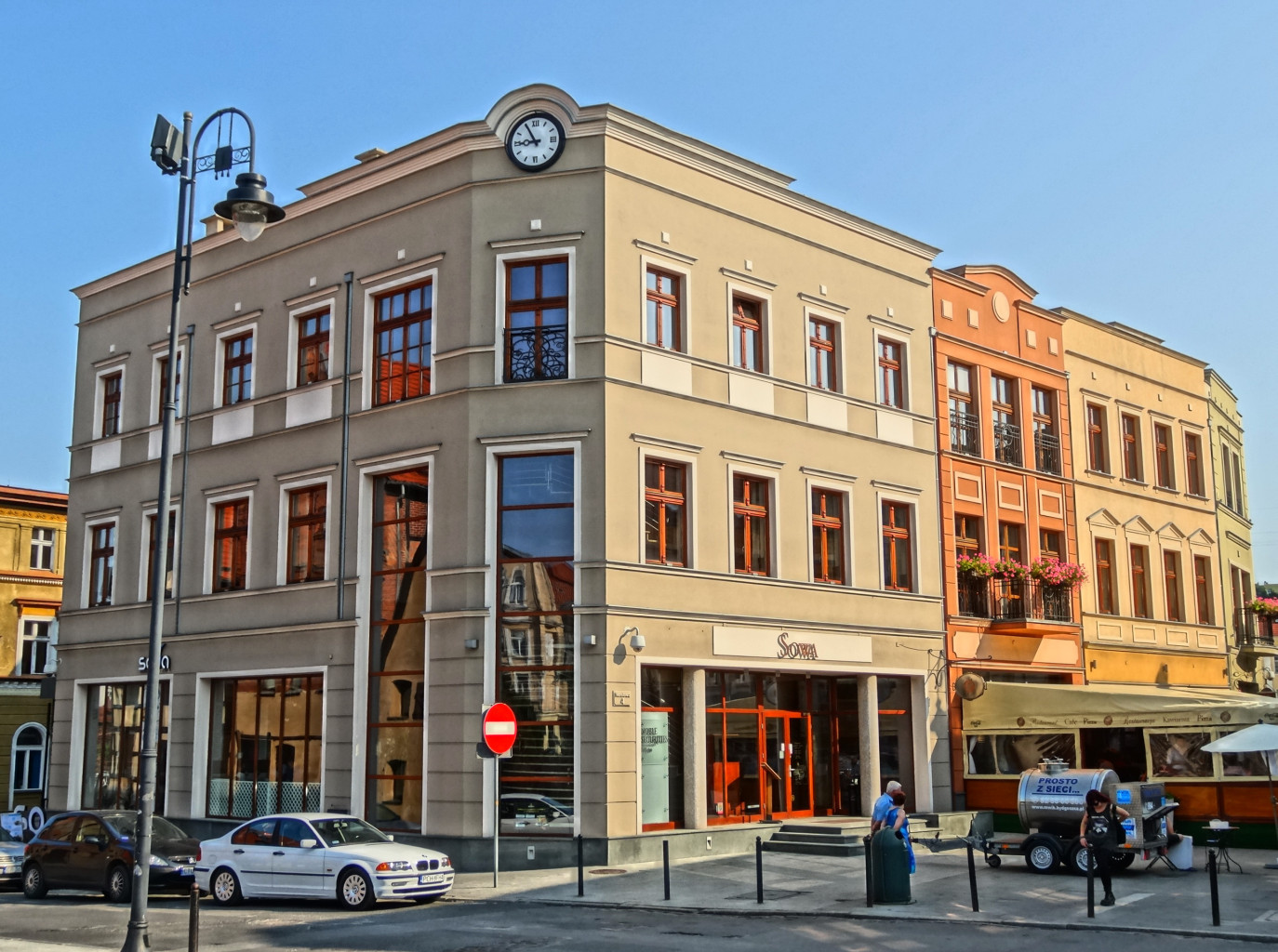 Ulica Mostowa w Bydgoszczy